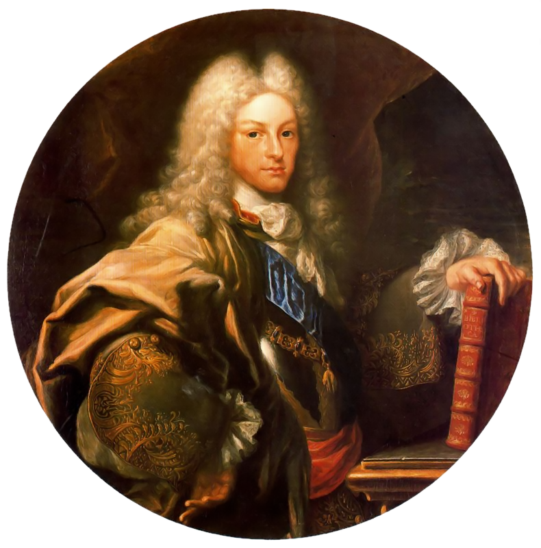 Retrato del rey Felipe V de España (1683-1746), realizado en 1727. El monarca aparece luciendo una casaca verde oliva, la insignia de la orden del toisón de oro y descansa su mano sobre un libro que lo sostiene una consola barroca